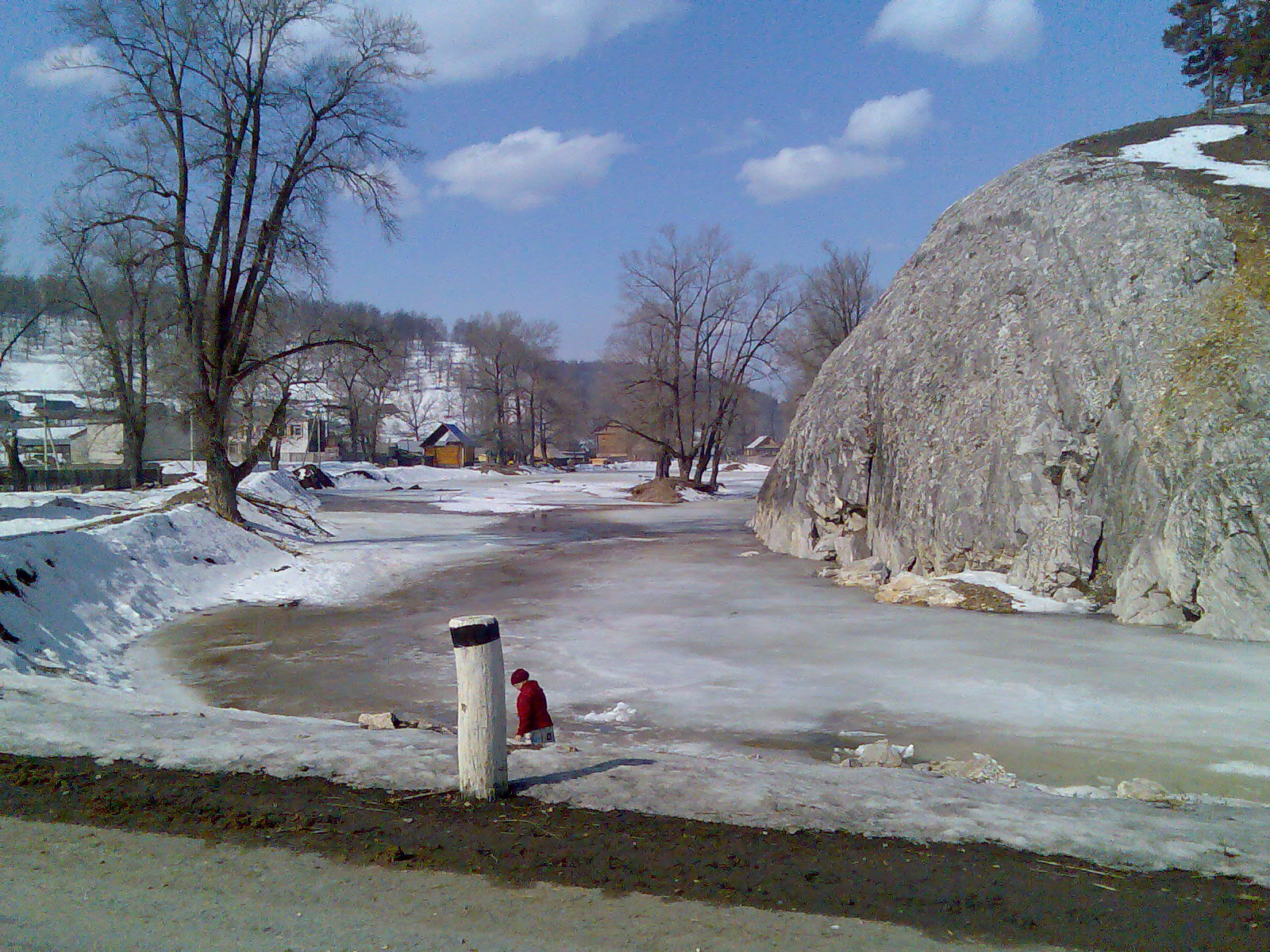 Речка Алакуян